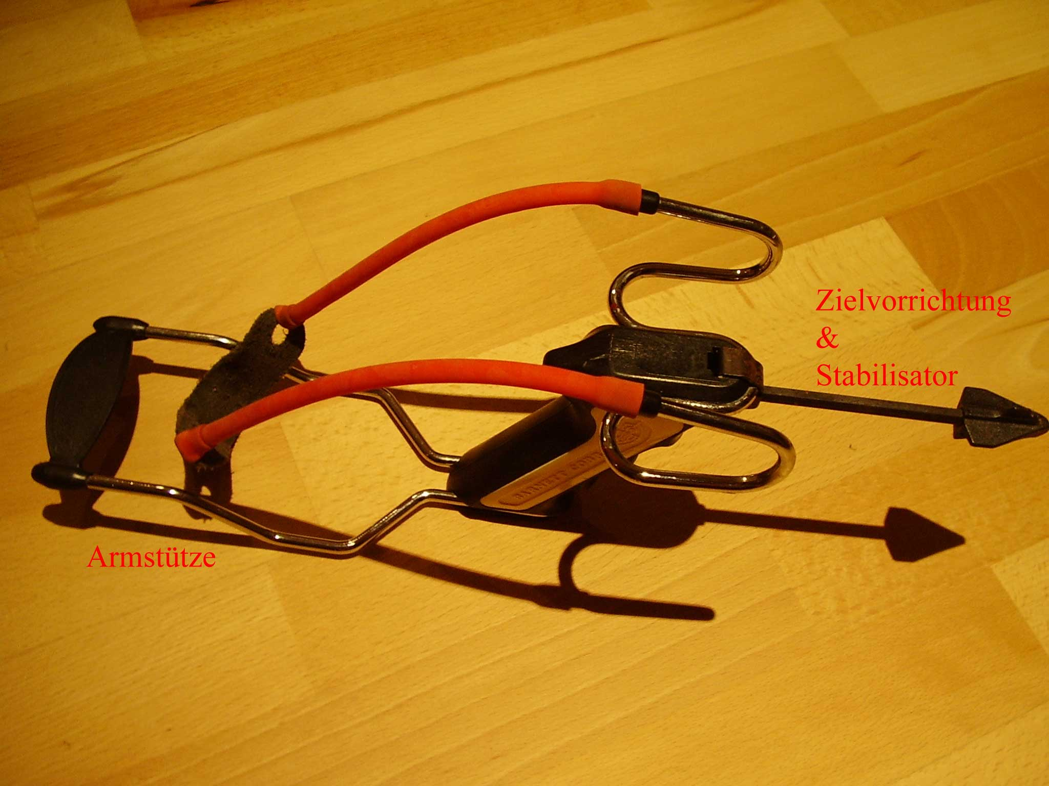 Bildbeschreibung: Präzisionssteinschleuder mit Armstütze, Zielvorrichtung und Stabilisator Quelle: selbst fotografiert Fotograf/Zeichner: SG-Sniper Datum: 07.06.2006